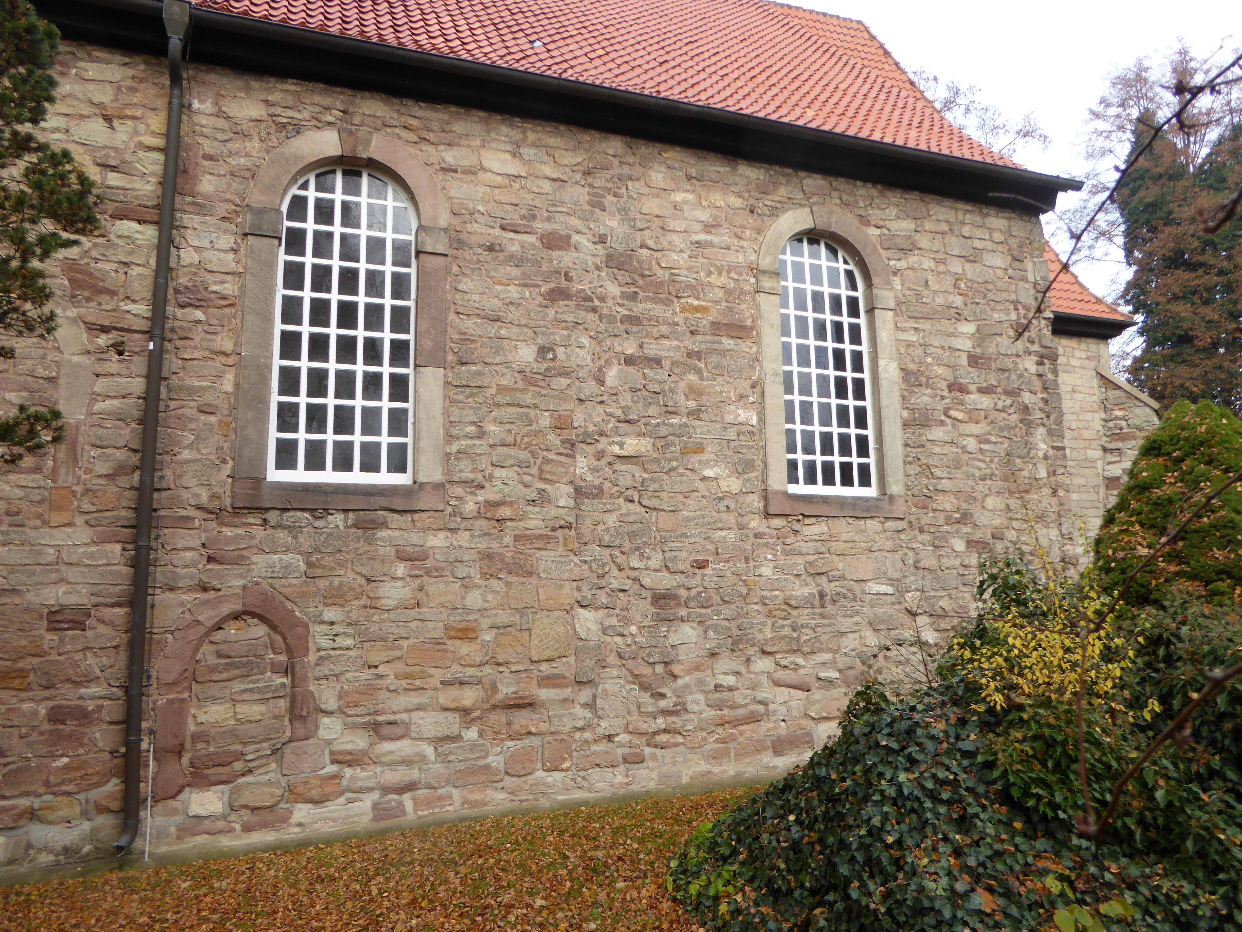 Östliche Hälfte der Südwand der ev.-luth. Kirche St. Christophorus in Reinhausen, Gemeinde Gleichen, Südniedersachsen.